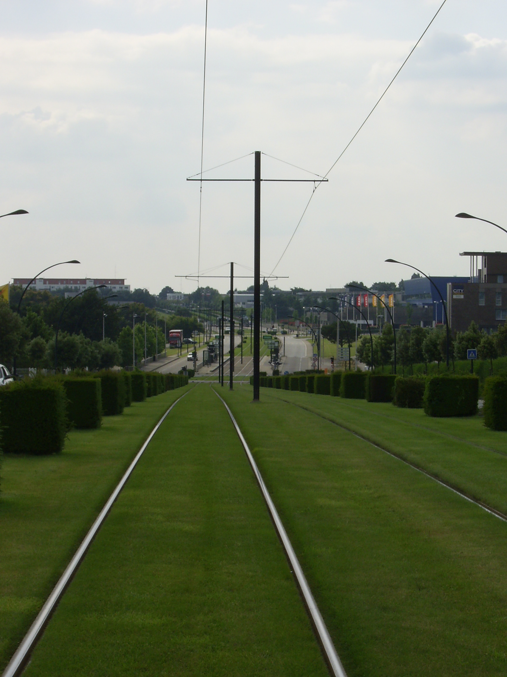 Boulevard Salvador Allende de Saint-Herblain (Loire-Atlantique)